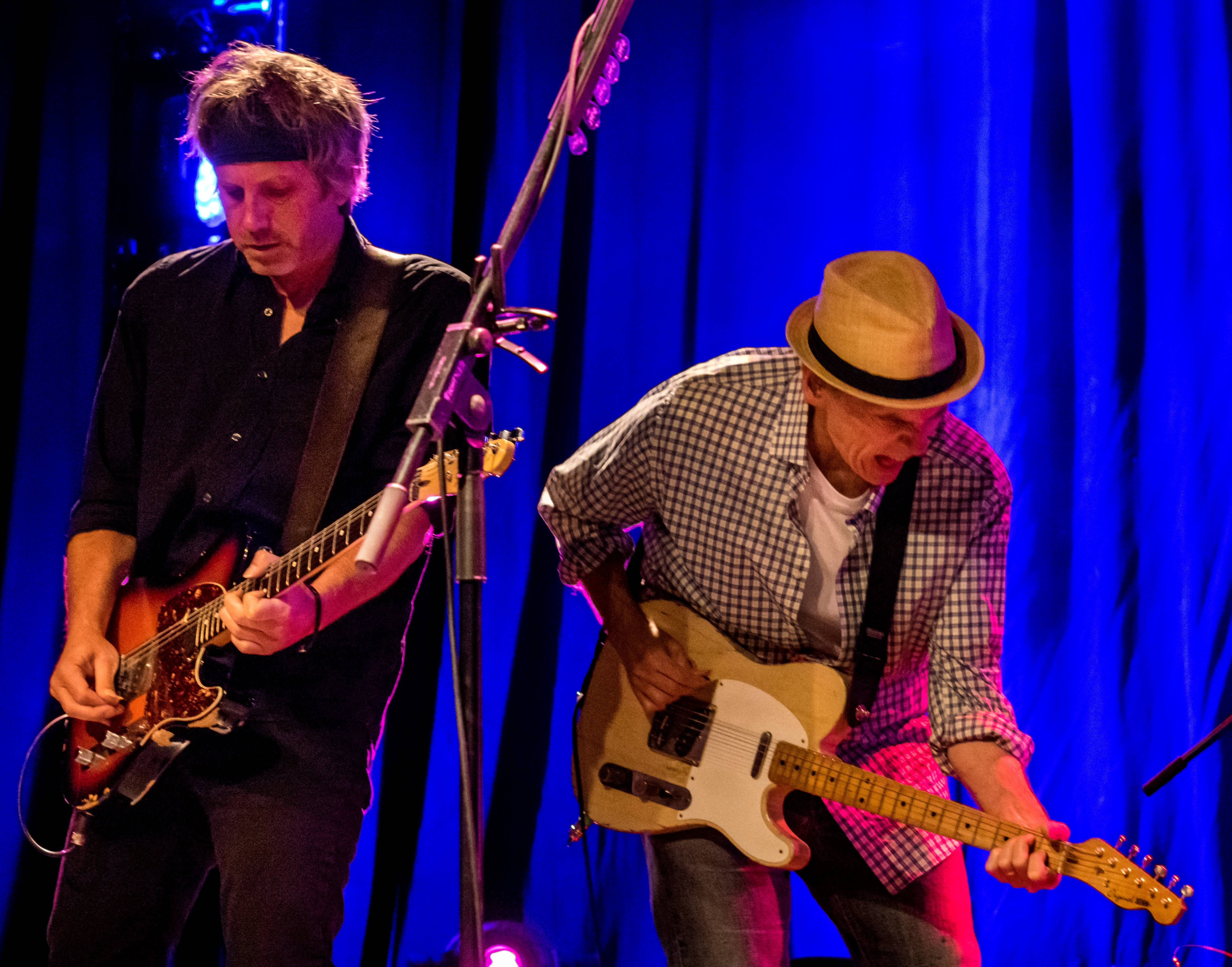 Bilder vom ZMF 2015 John Hiatt & The Combo 09. Juli 2015